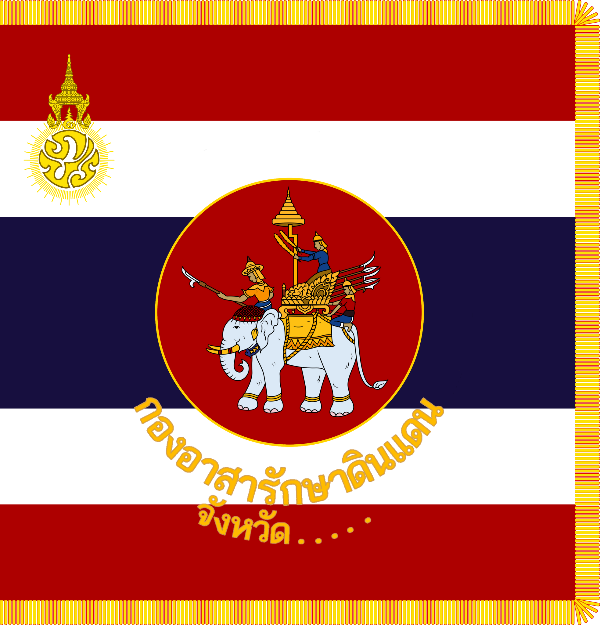 ธงกองอาสารักษาดินแดนจังหวัด มีลักษณะและสีอย่างเดียวกับธงกองอาสารักษาดินแดน แต่ด้านหน้าของผืนธงที่ใต้ความว่า “กองอาสารักษาดินแดน” ให้มีชื่อจังหวัดที่กองอาสารักษาดินแดนตั้งอยู่ ปักด้วยดิ้นทอง